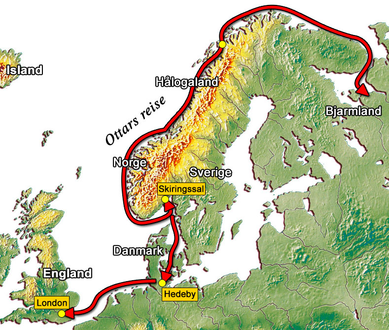 Ottar von Hålogaland bereiste um 890 im Auftrag König Alfreds des Großen von Wessex die Nordküste Norwegens bis ins Weiße Meer. Anschließend fuhr er durchs Kattegatt nach Hedeby und dann nach London.